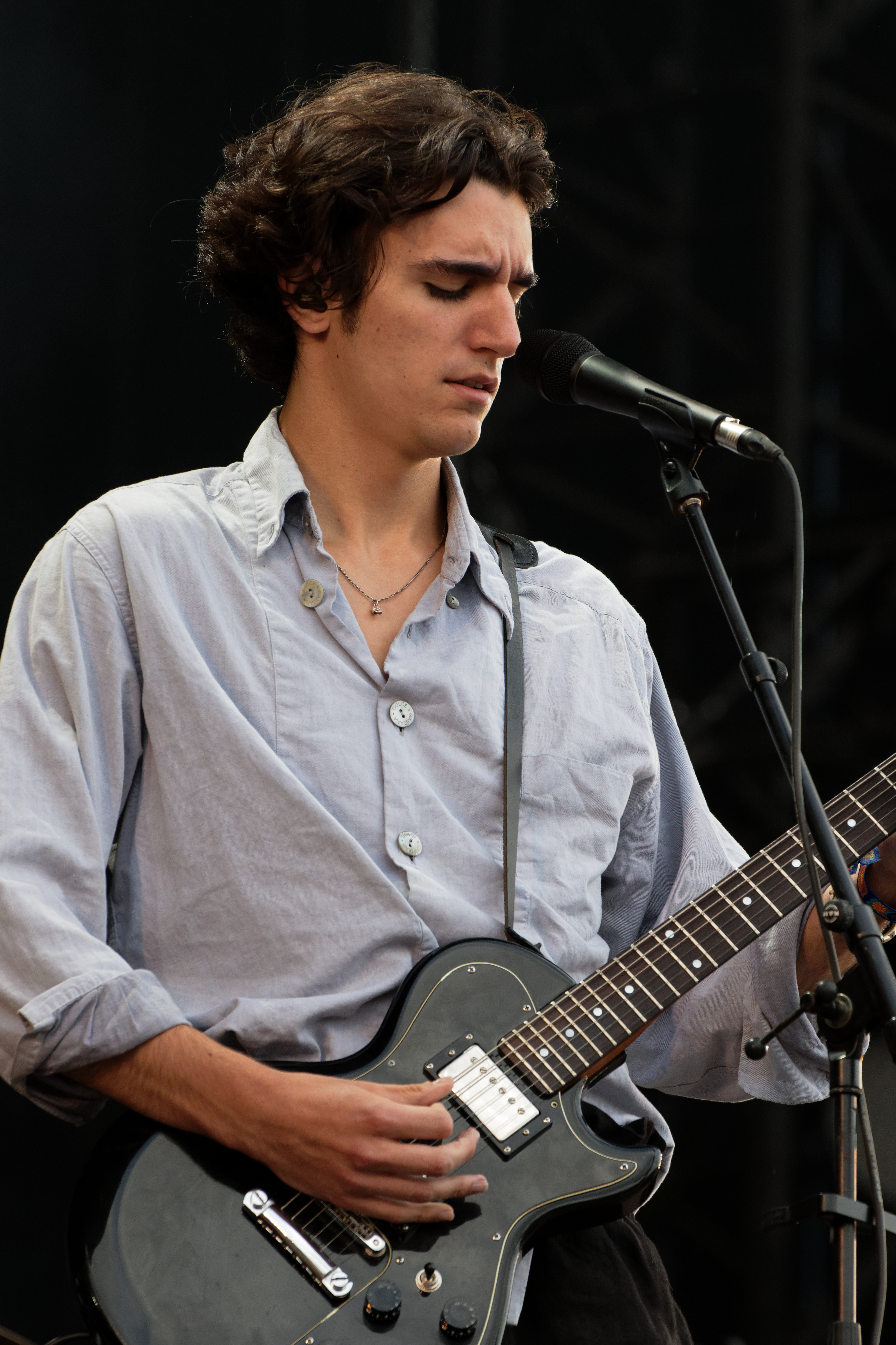 Tamino en concert lors du festival des vieilles charrues 2019.